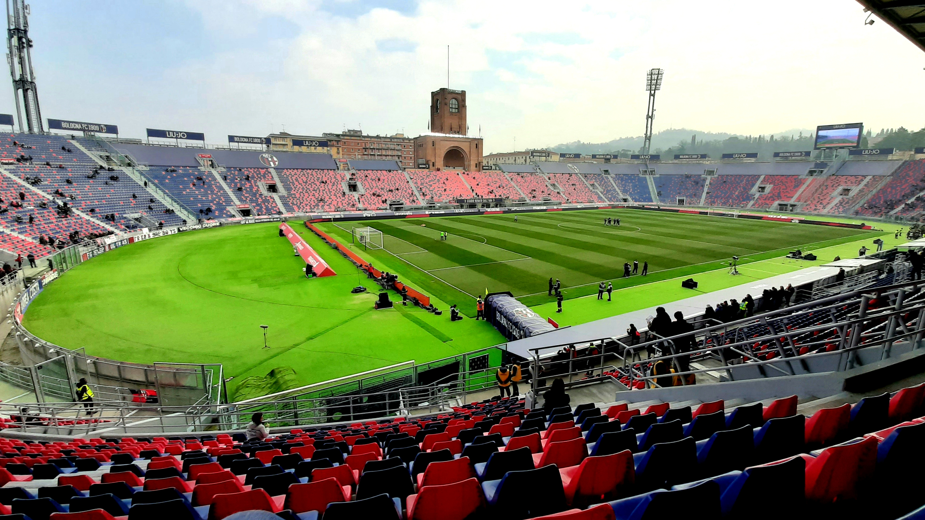 Veduta dello Stadio Renato Dall'Ara di Bologna prima della gara Bologna-Brescia del 01-02-2020